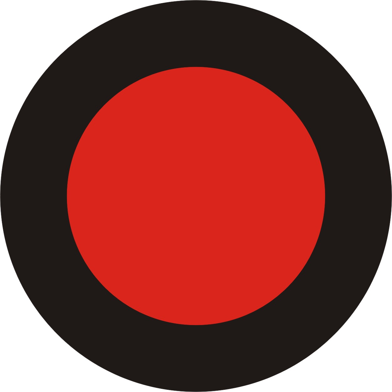 Símbolo do SENTIMENTALISMO